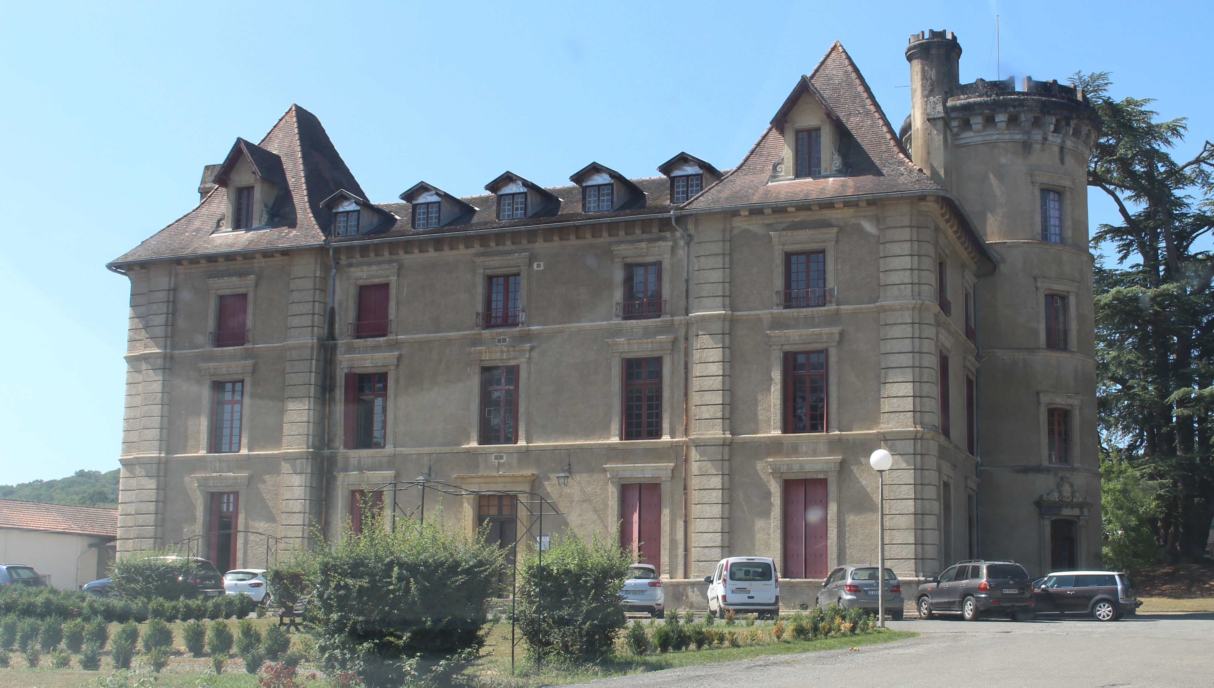 Château de Lascazères (Hautes-Pyrénées)